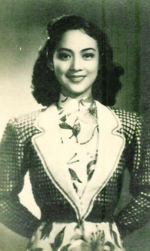 王丹凤，女，浙江宁波，中国电影演员。